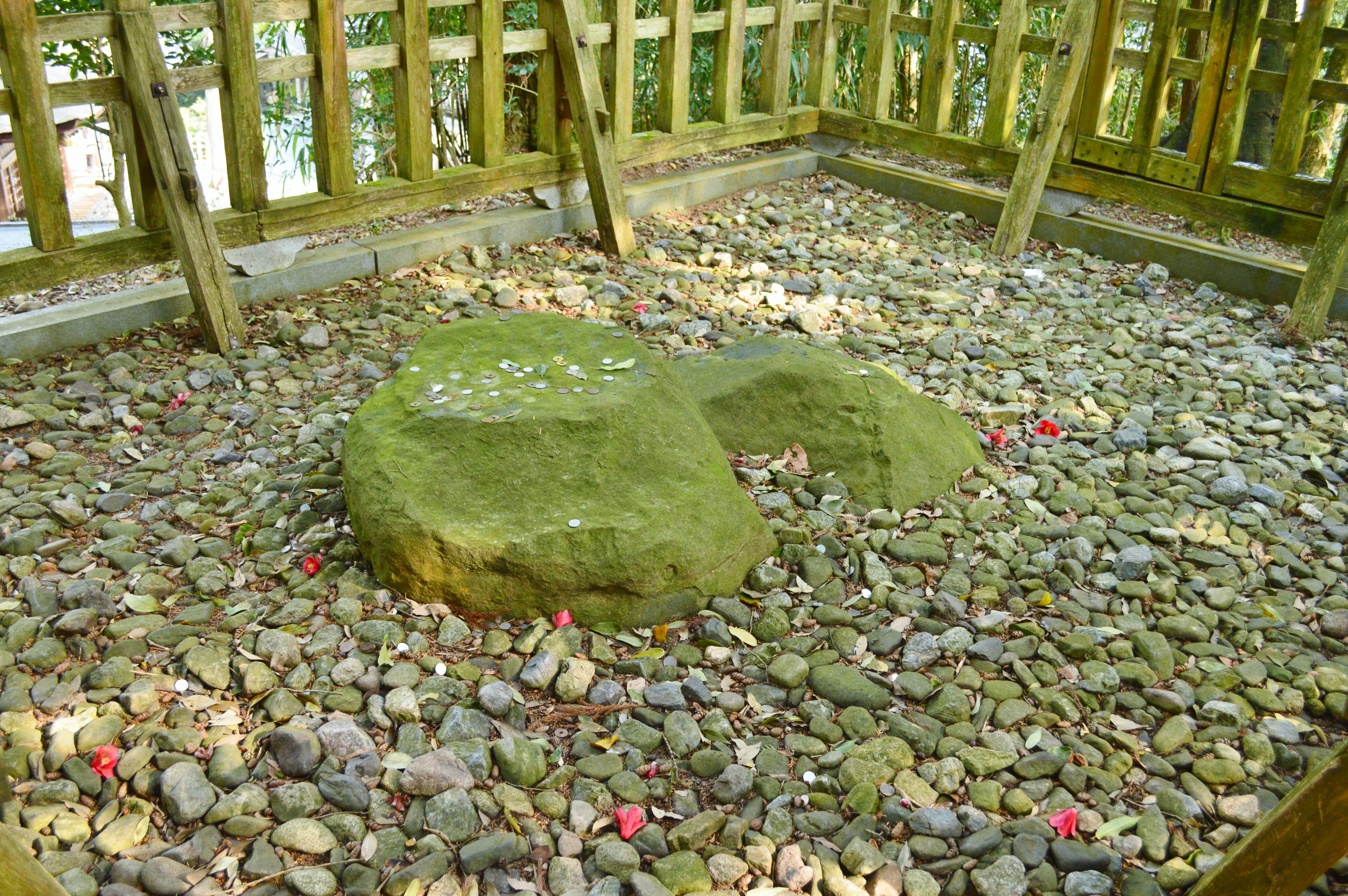 宇倍神社 双履石 Nikon D3200